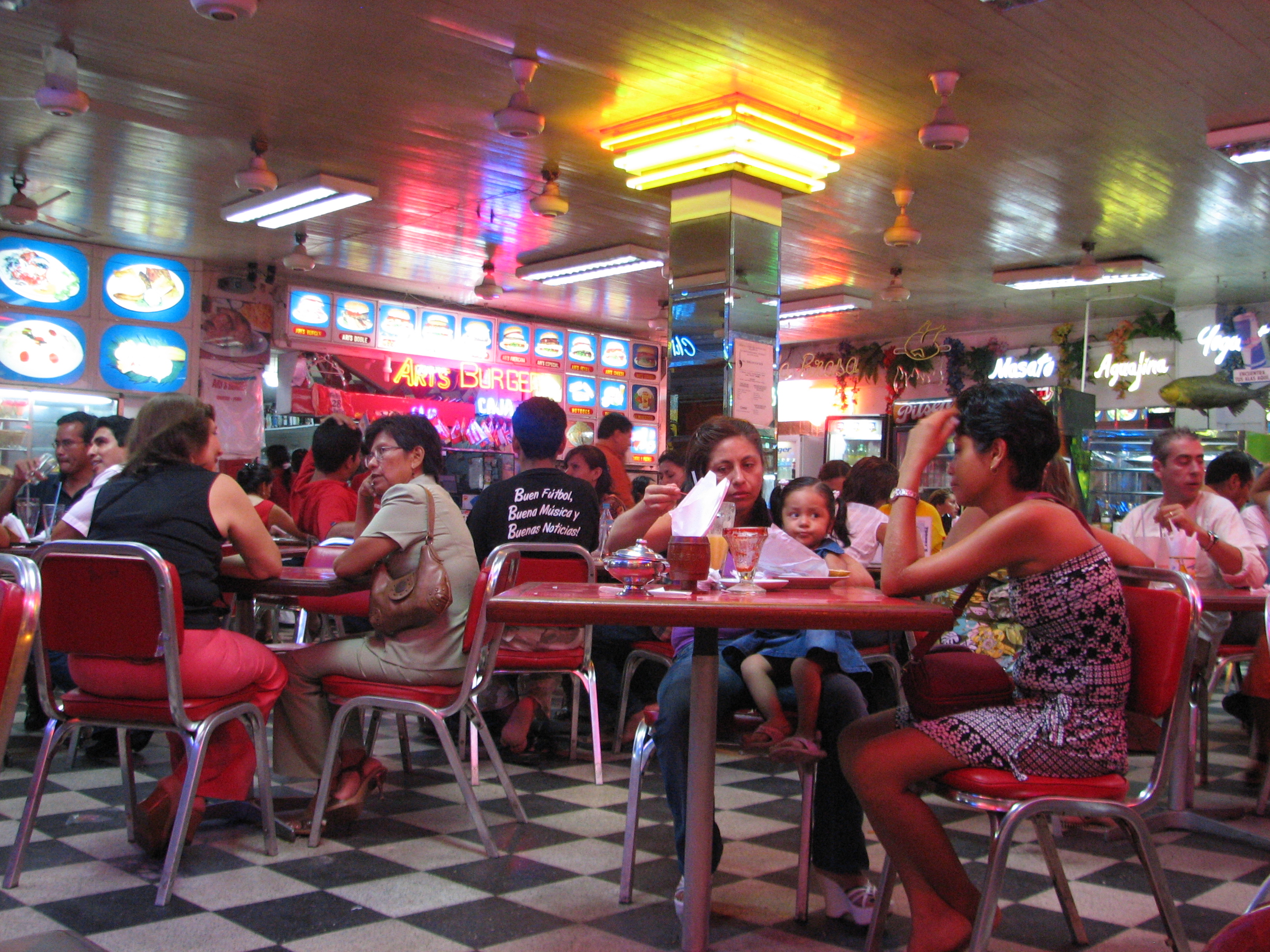 Restaurant on Plaza de Armas in Iquitos/Maynas/Loreto, Peru.